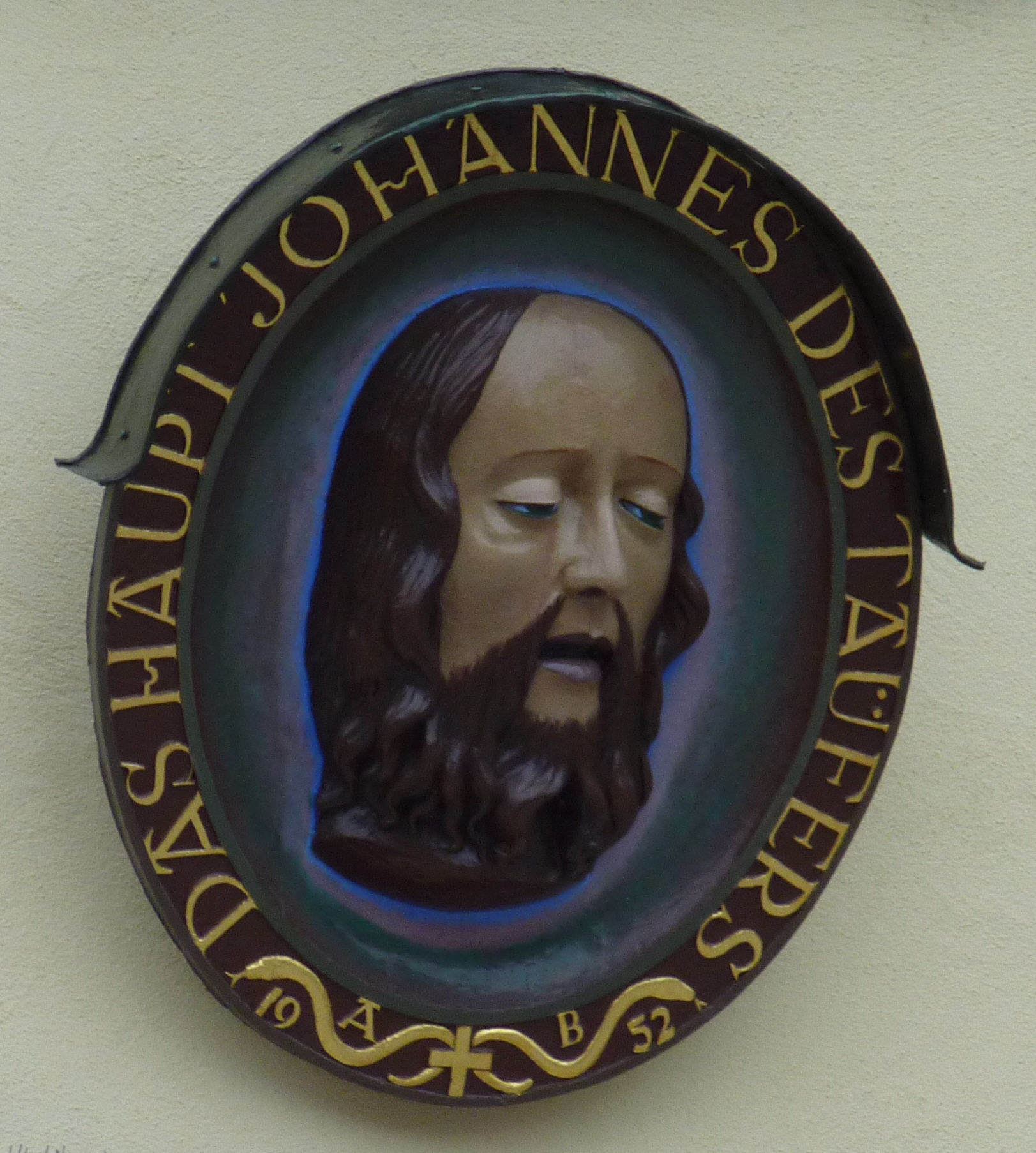 Schmuck an einer Apotheke in Künzelsau